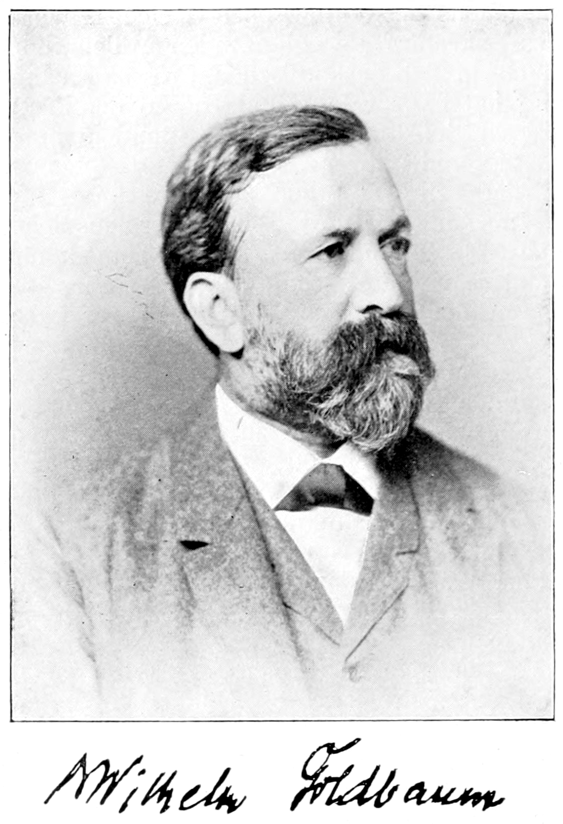 Wilhelm Goldbaum S. 60